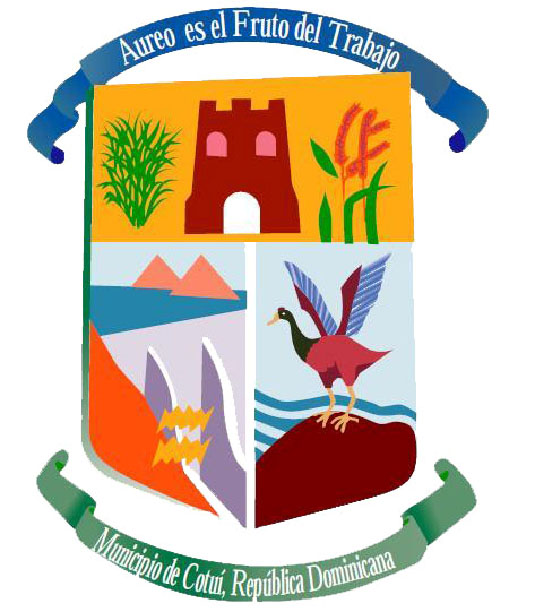 Escudos De Armas Municipio de Cotui